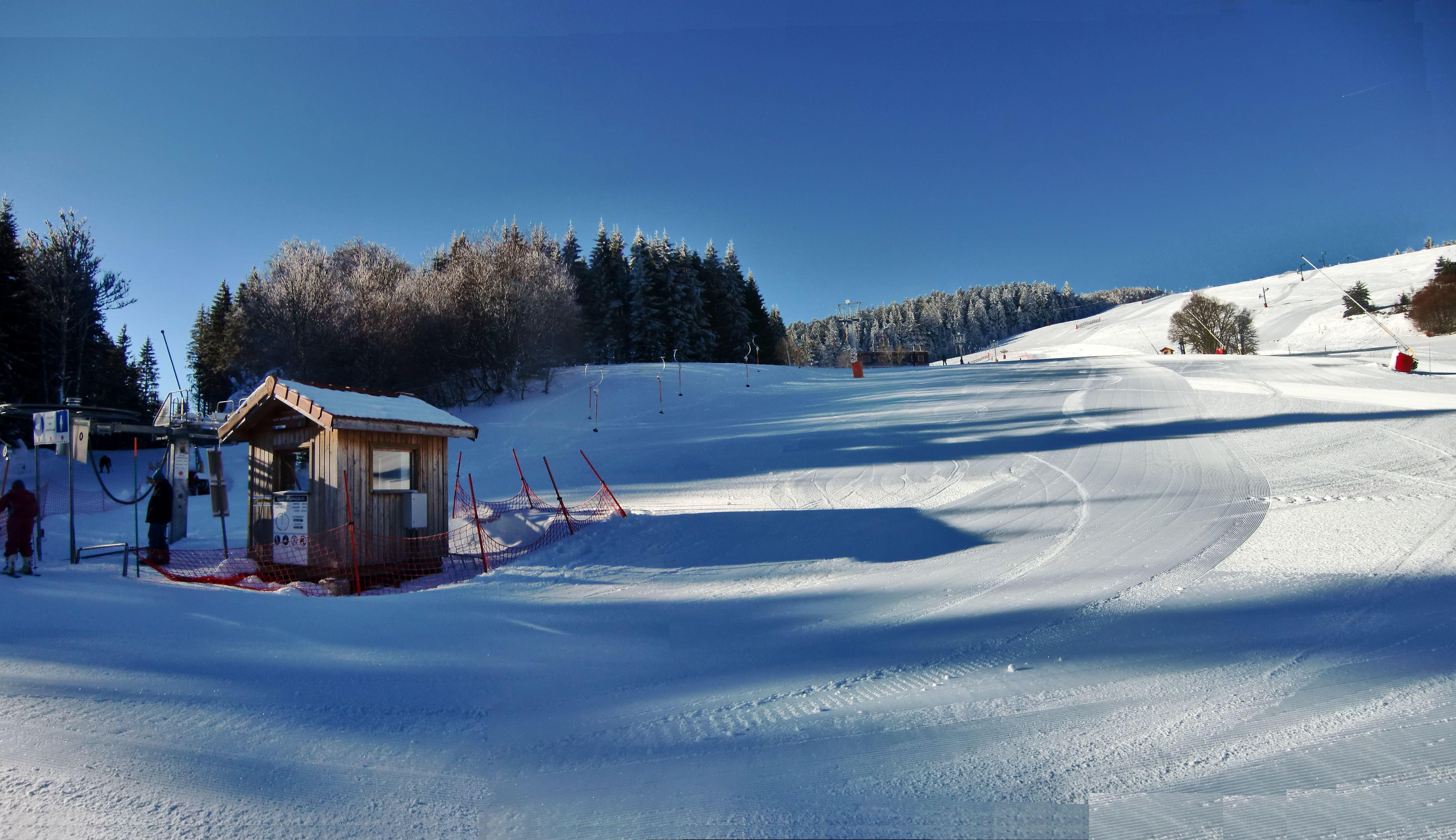 Réaménagement pistes vertes des Jonquilles en 2010